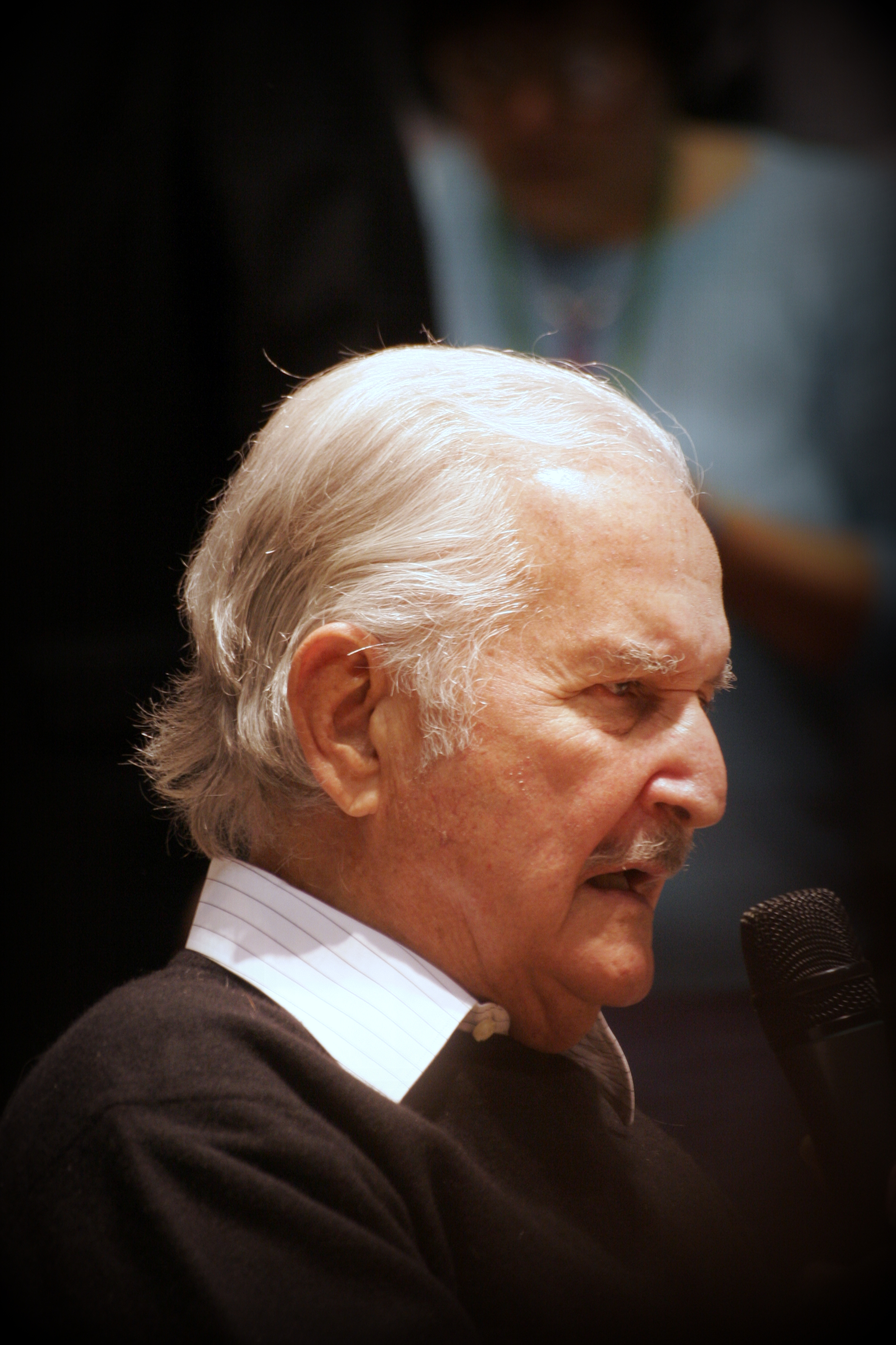 Carlos Fuentes, en mars 2009 à Paris.